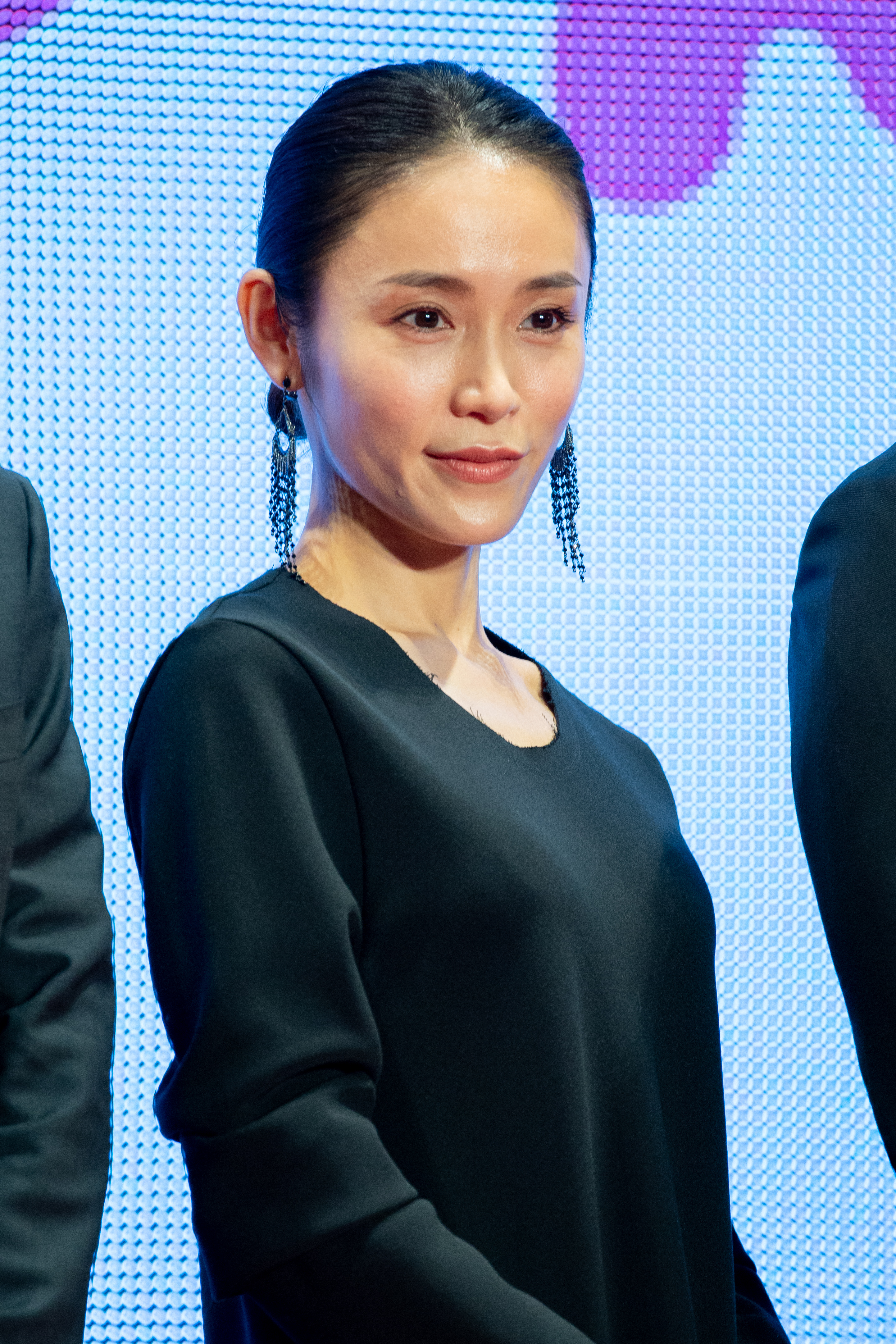 第30回 東京国際映画祭 人魚の眠る家 レッドカーペットイベント 山口紗弥加